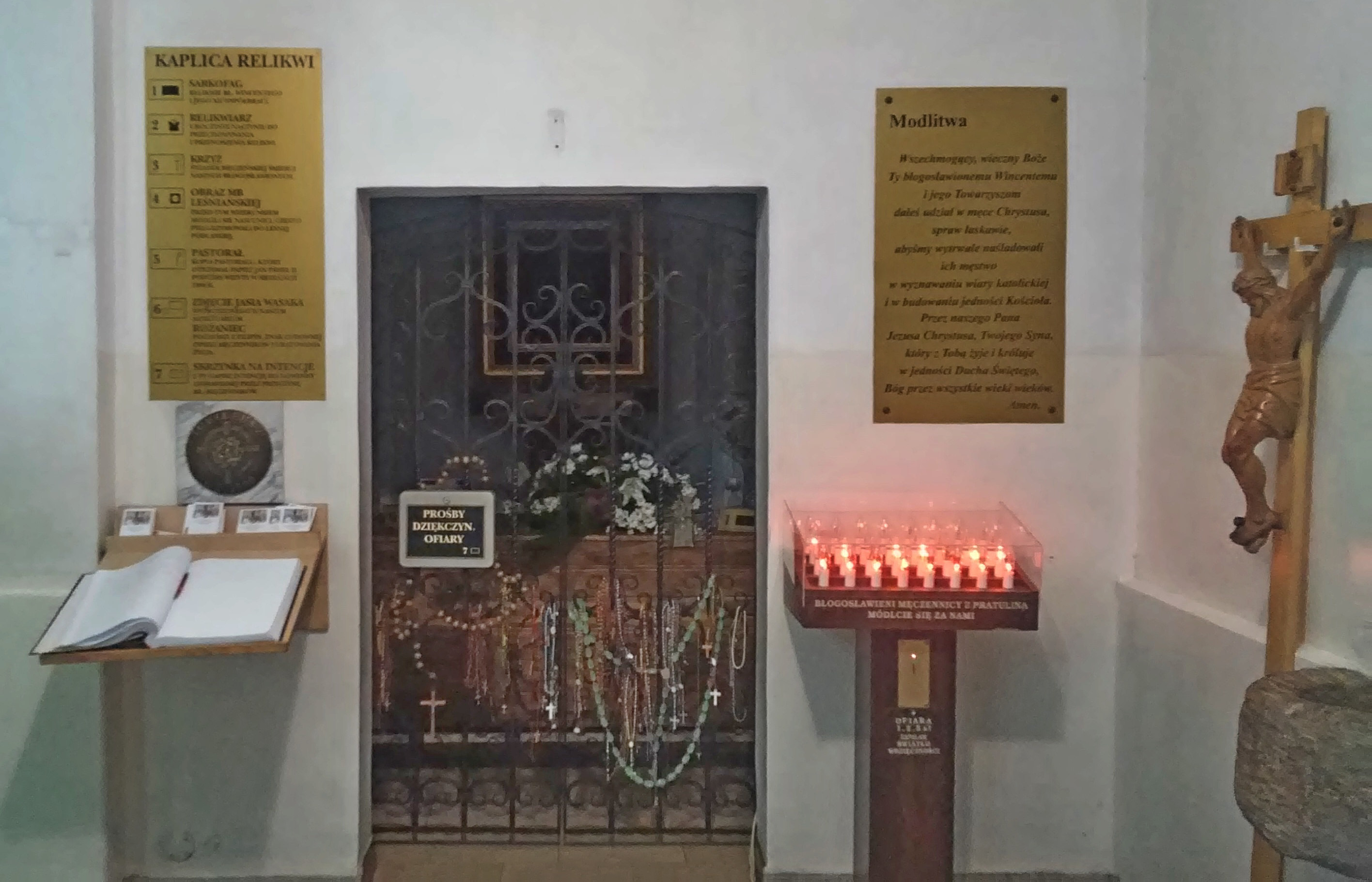 Kaplica męczenników z Pratulina z ich relikwiarzem, kościół w Pratulinie